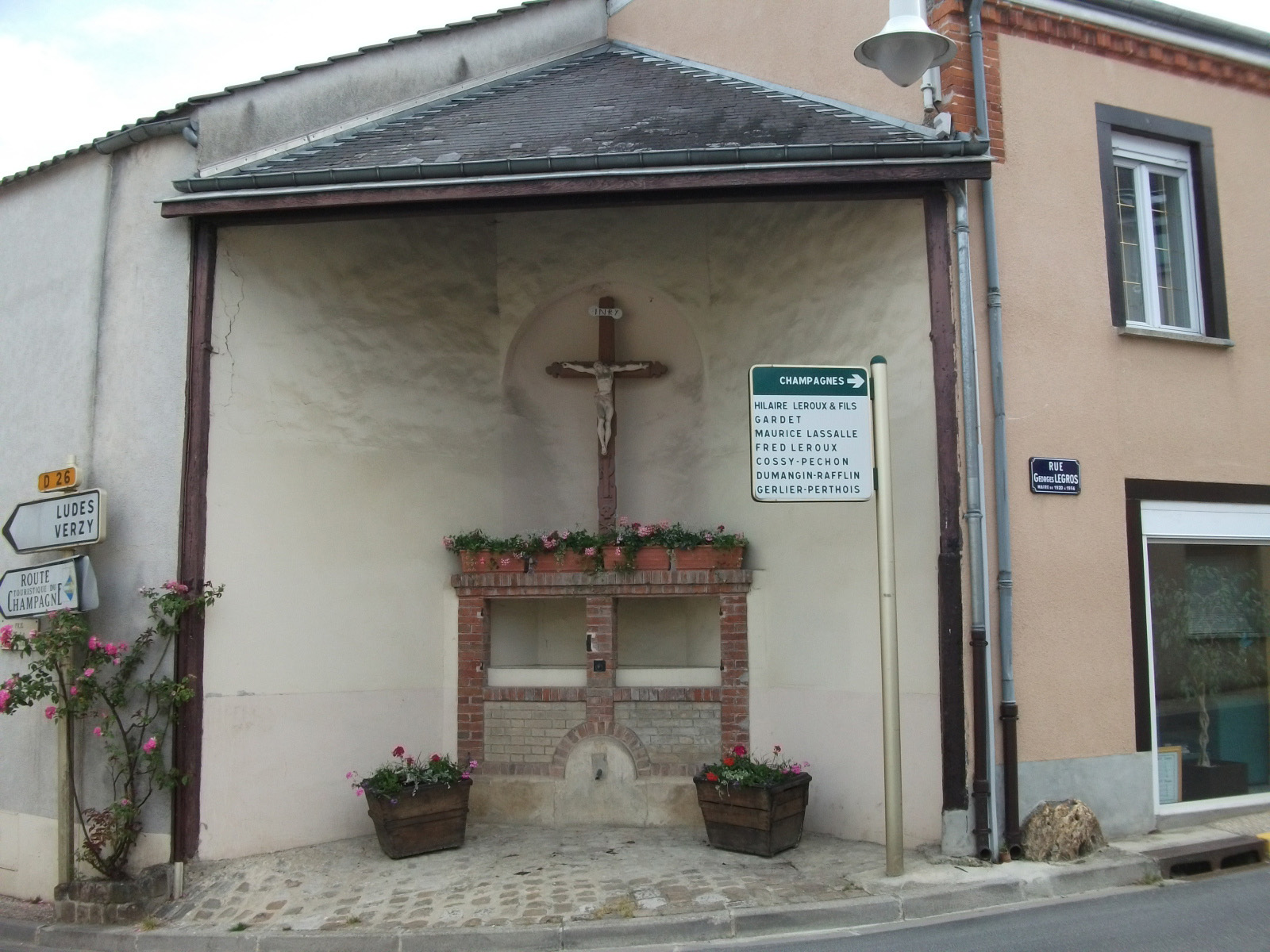 croix se situant dans le village de Chigny les roses.